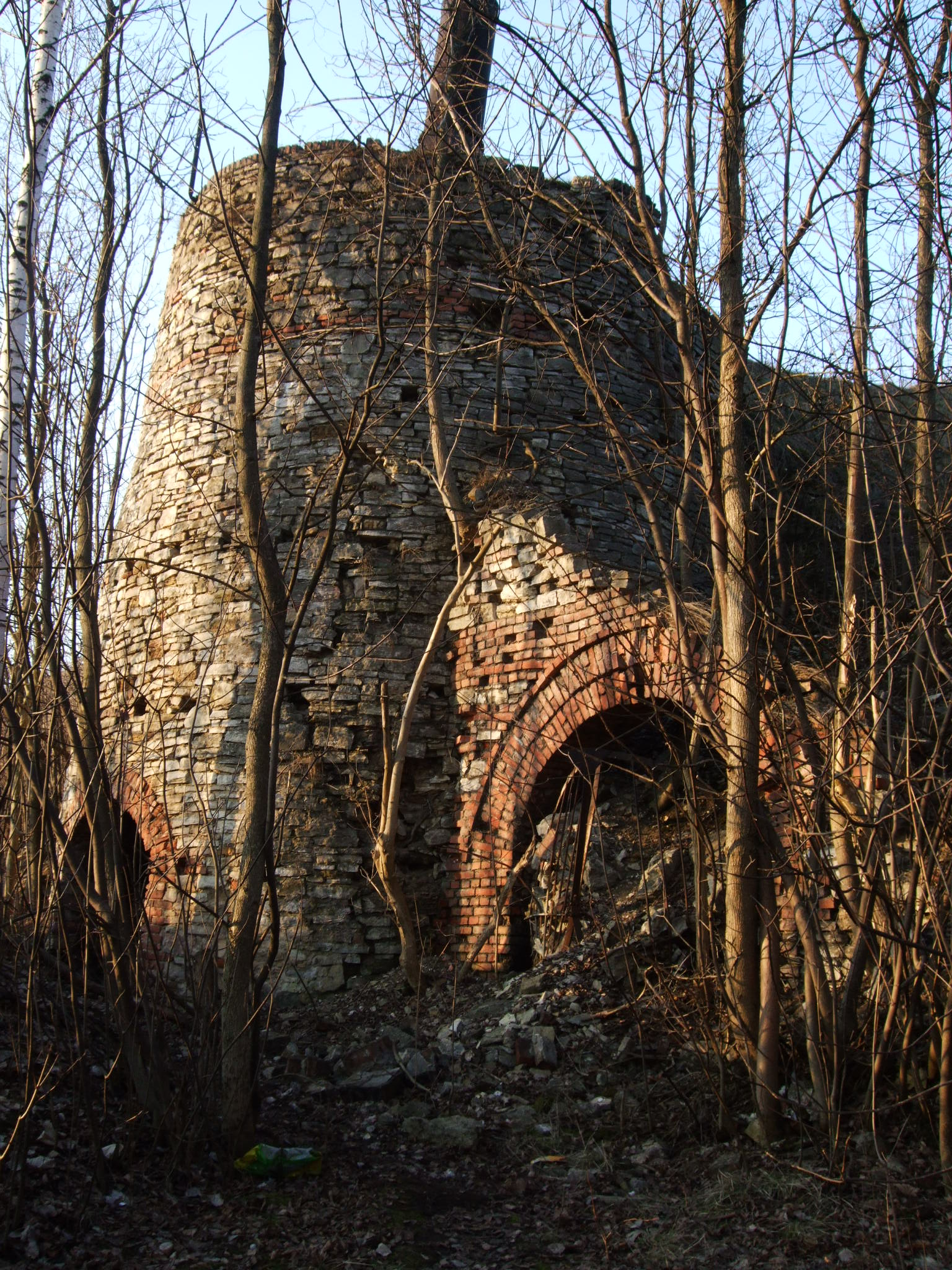 Nieczynny wapiennik w Dziećkowicach, przy ulicy Długiej.